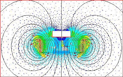 Linie sił pola magnesu z lewitującym nadprzewodnikiem